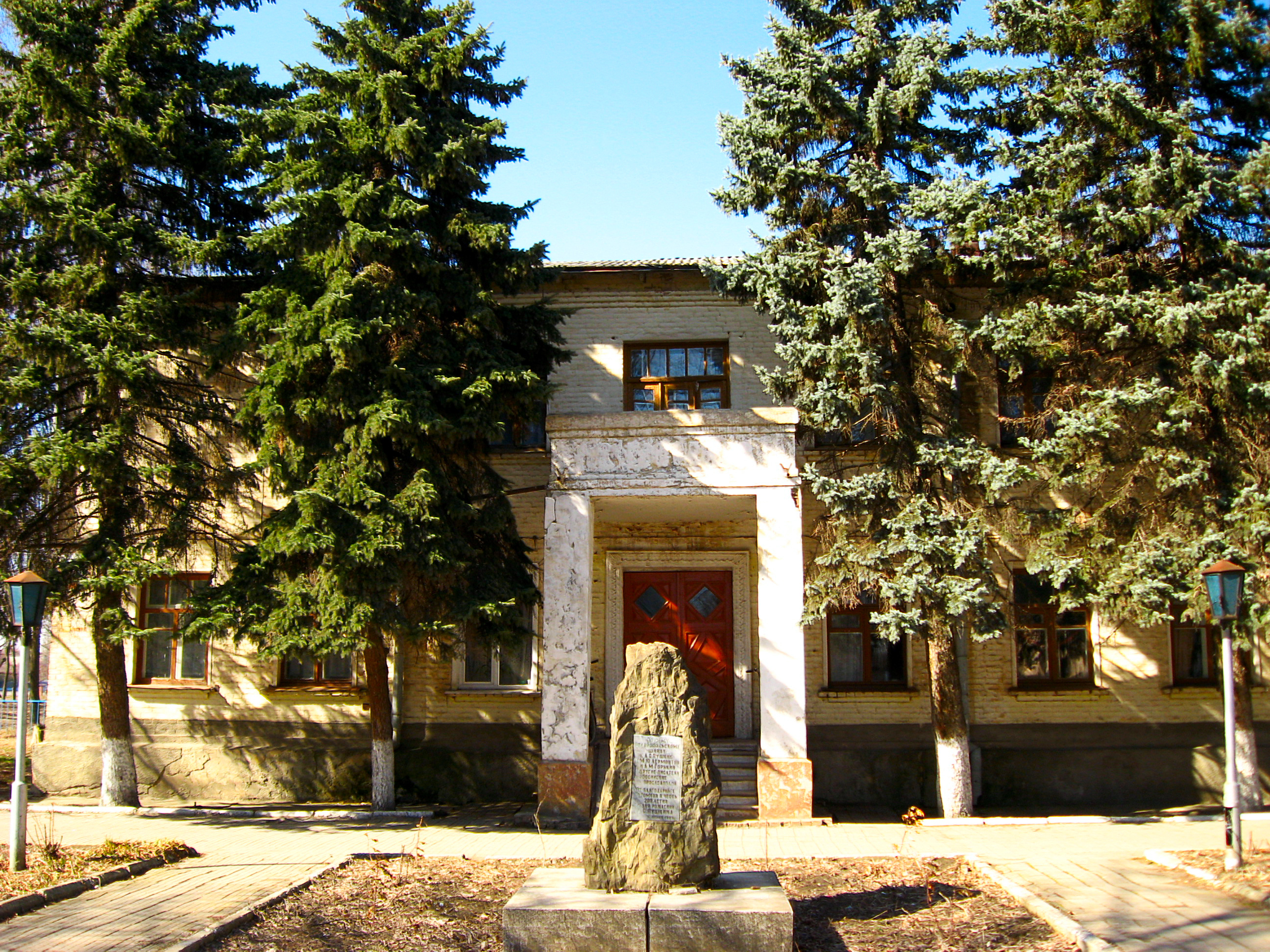 Детская музыкальная школа станицы Васюринской